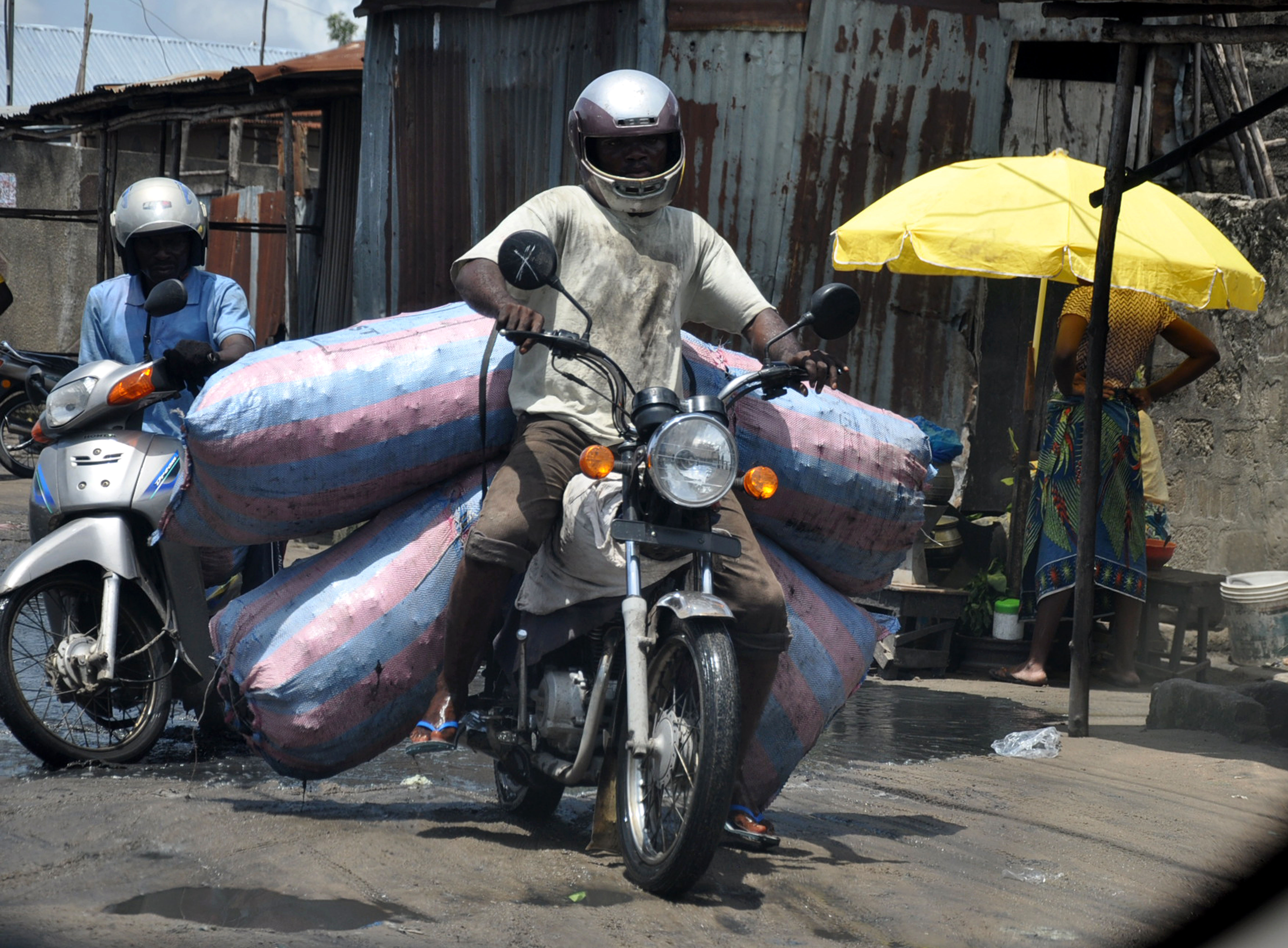 & he is obliged to overload his motorcycle with goods so as not to be a competitor This is an image with the theme "Africa on the Move or Transport" from: Benin